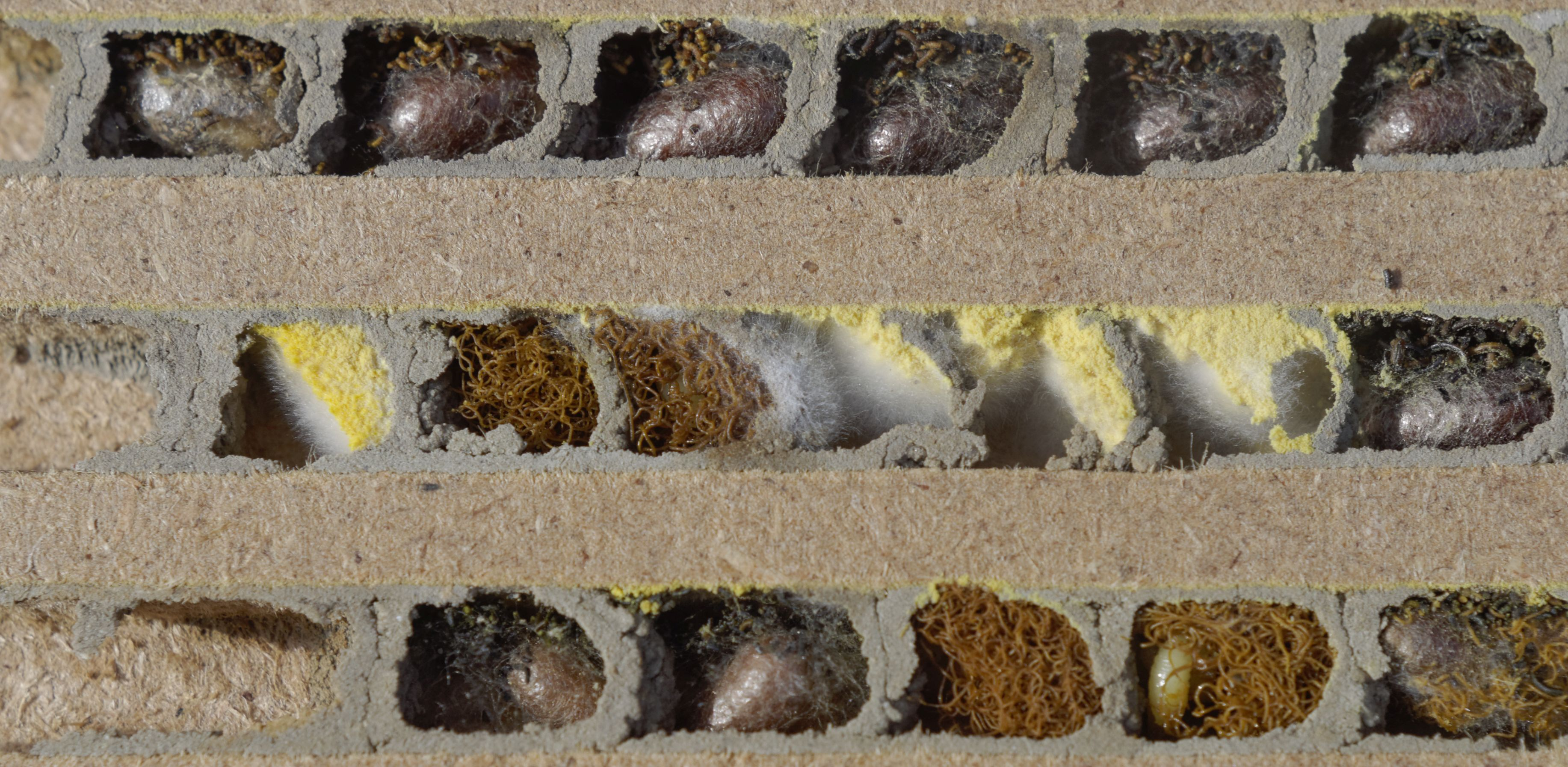 Bilder vom Insektenhotel